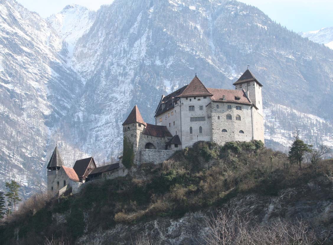 Schloss Balzers